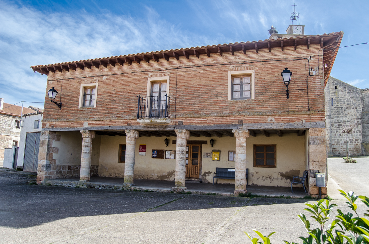 Ayuntamiento de Villahizán de Treviño